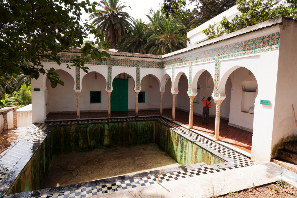 1715, c’est la date supposée de fondation de Dar Abdellatif, qui aura connu jusqu’à sa réquisition par l’armée française, nombre de propriétaires. Le dernier propriétaire algérien, Sieur Abdellatif, lui laissera par ailleurs son nom. La villa a accueilli une centaine de peintres et d’artistes du monde entier, avant d’être l’objet d’une restauration de 2006 à 2008. Depuis, le lieu retrouve une seconde vie grâce à des résidences d’artistes, des expositions, tout en abritant tout au long de l’année le siège social de l’Agence Algérienne pour le Rayonnement Culturel (AARC).